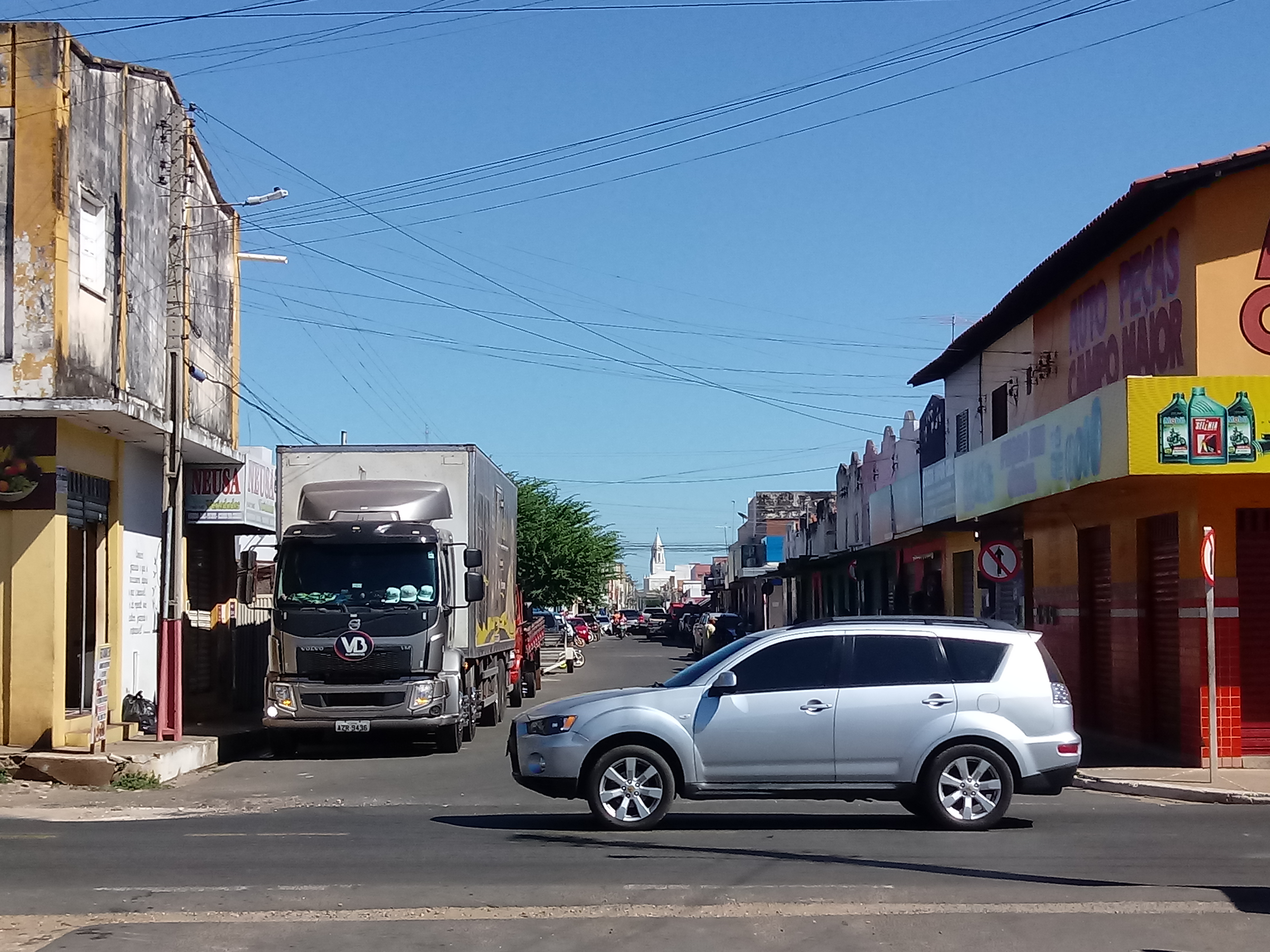 Rua senador José Eusébio, cruzamento com Br-343 em Campo Maior.